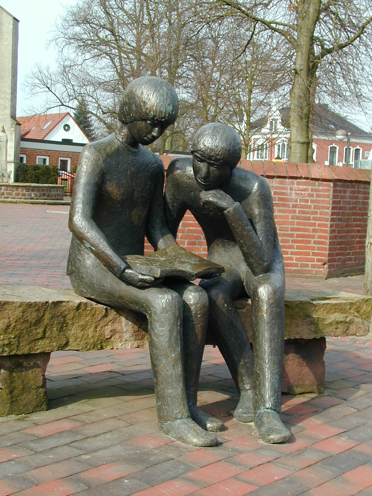 Skulptur Jan und Lili